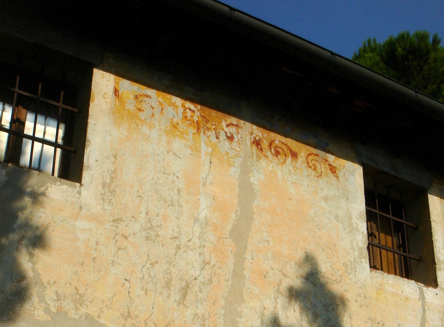 Monticella di Conegliano (Treviso): Villa Morpurgo Pini (XVII secolo), particolare dell'annesso con resti di affresco.